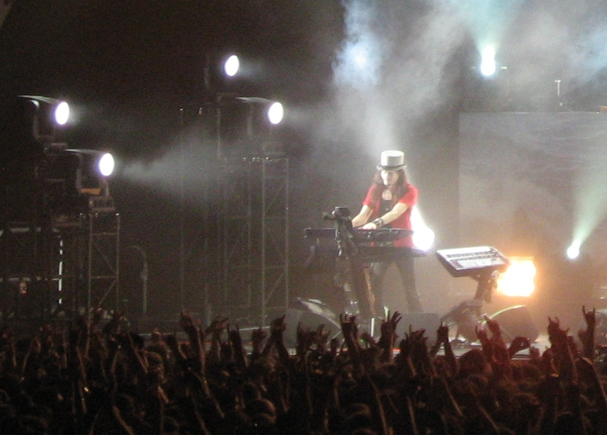 Tuomas Holopainen au Zénith de Paris, le 06 avril 2008.